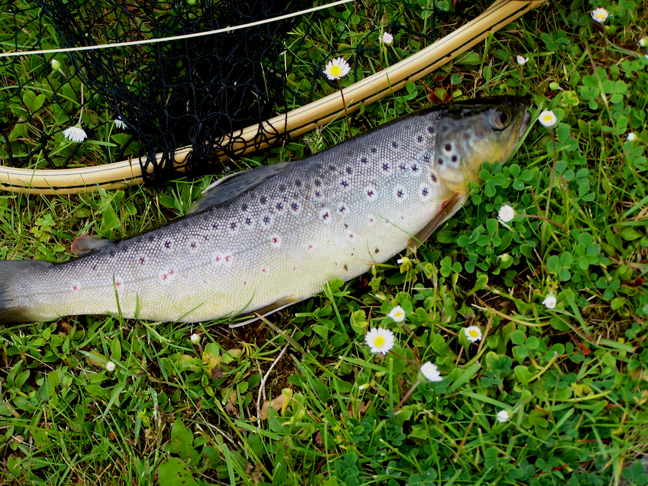 Schöne Bachforelle